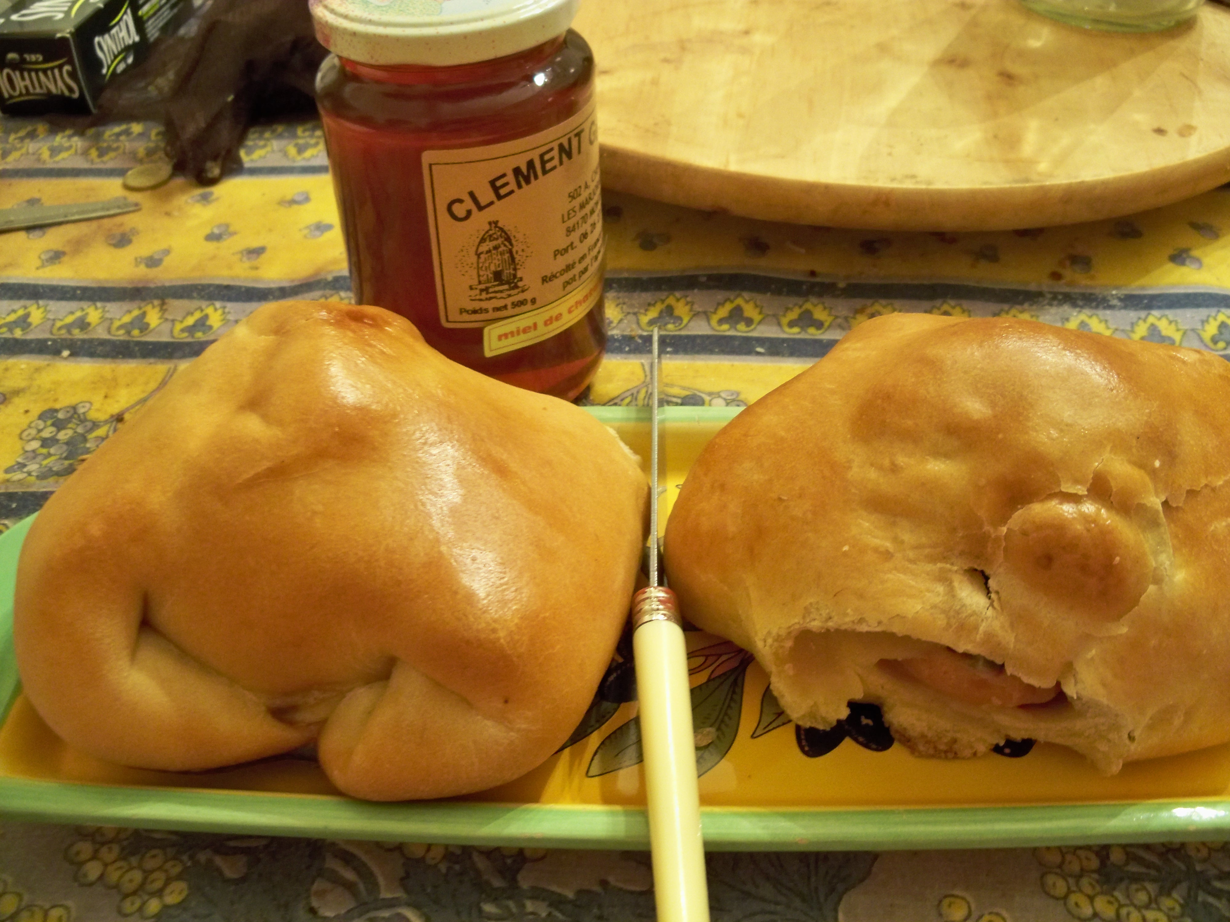 Pain coing, spécialité provençale à base de coing entier